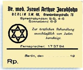 Rezeptvordruck des 1938 als „Krankenbehandler“ tätigen jüdischen Arztes Dr. med. Israel Arthur Jacobsohn aus Berlin